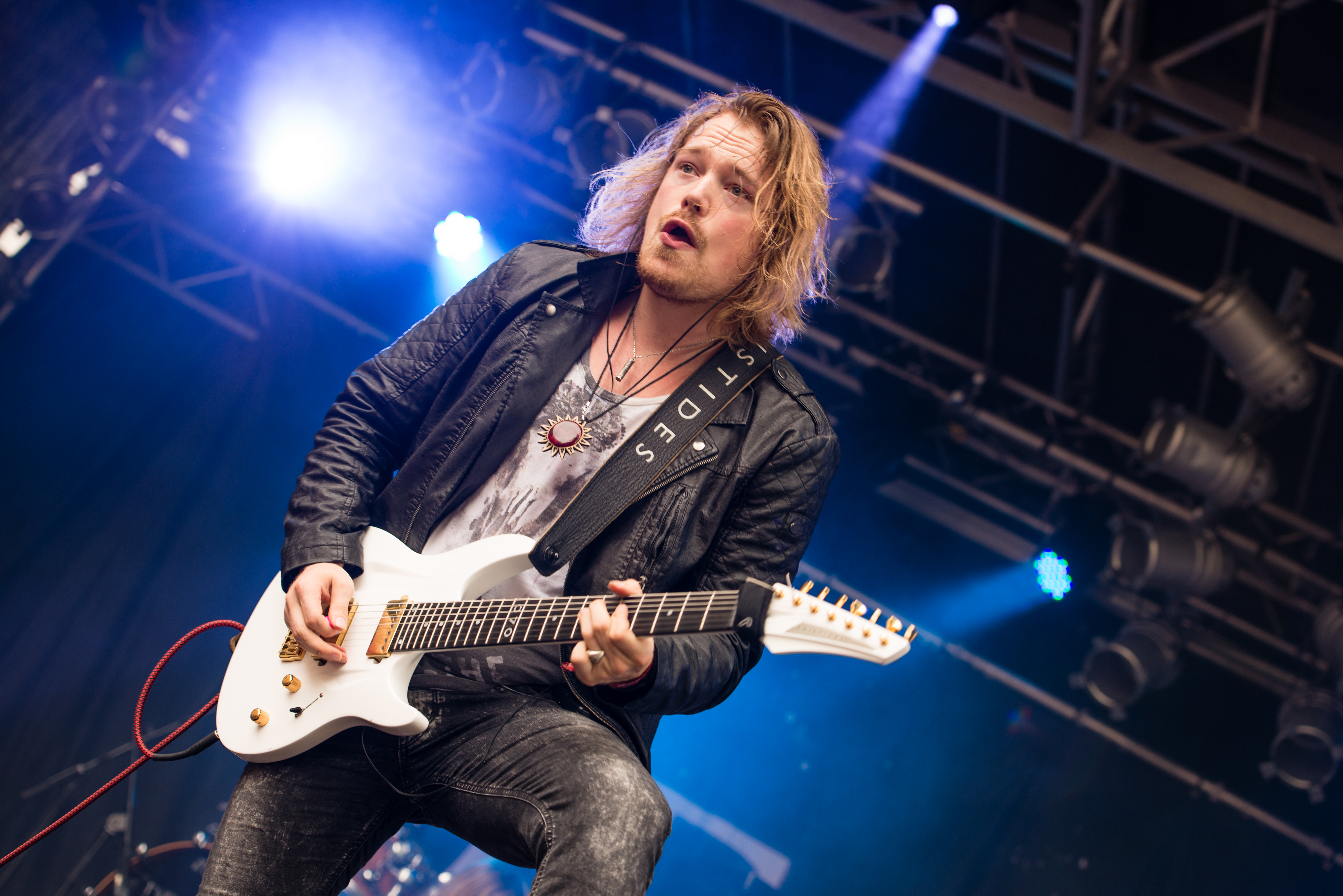 'Castle Rock 2014 - Mülheim an der Ruhr': 'Delain'